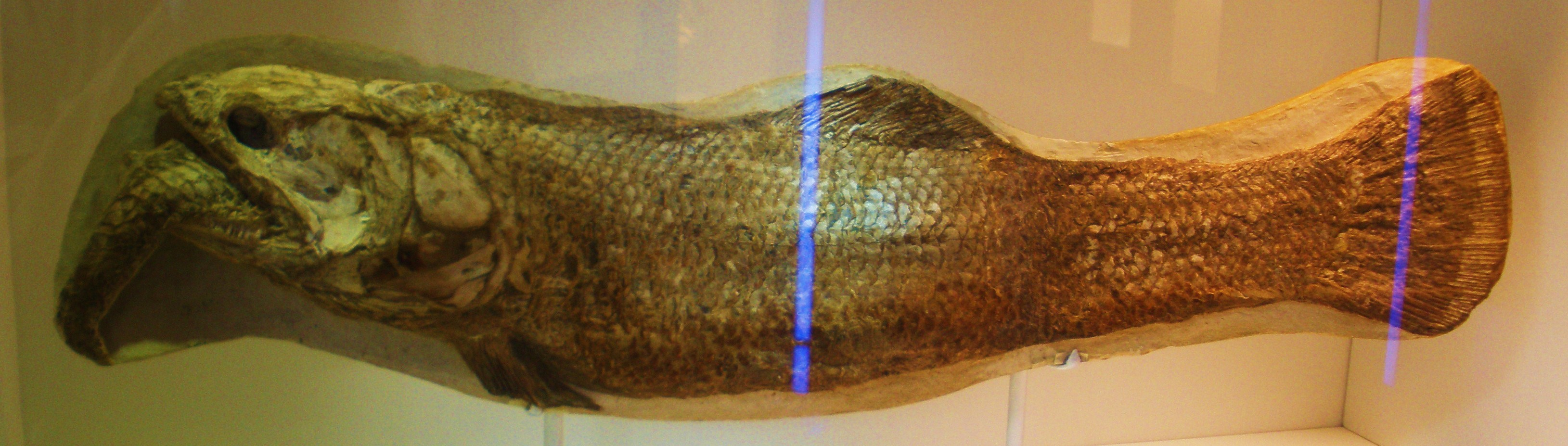 fossil of Calamopleurus and Rhacolepis